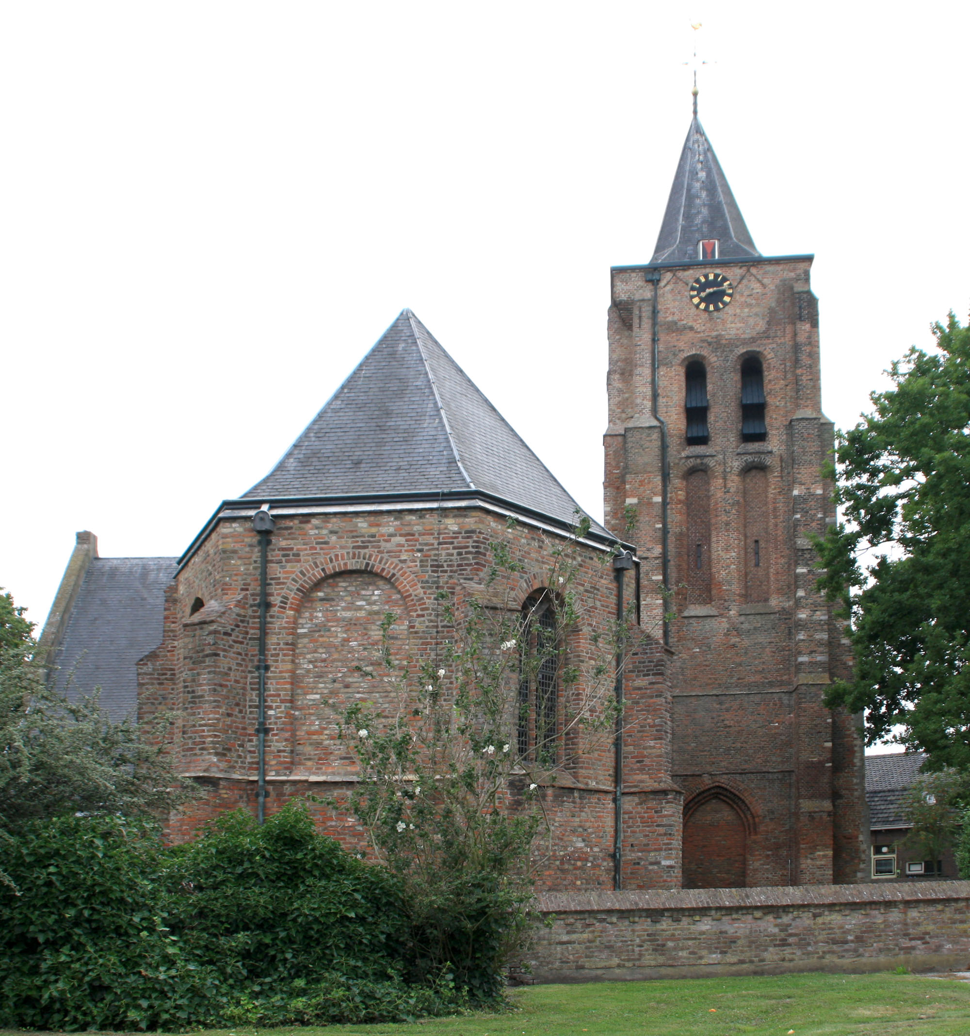 Nederlands Hervormd Kerk, Raadhuisstraat 15, Waarde (gemeente Reimerswaal). Rijksmonument nr: 32426. De kerk was gewijd aan een tweetal heiligen, de H. Maagd Maria en de H. Jacobus de Meerdere. Fors. laat 14e eeuws bouwwerk, met haakse steunberen en dubbele galmgaten. Traptoren met decoratieve bekroning.